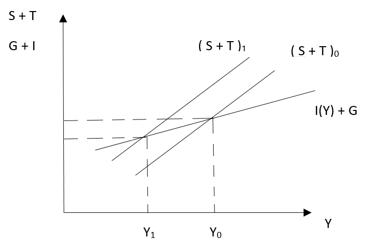 نمودار توضیح تناقض خست